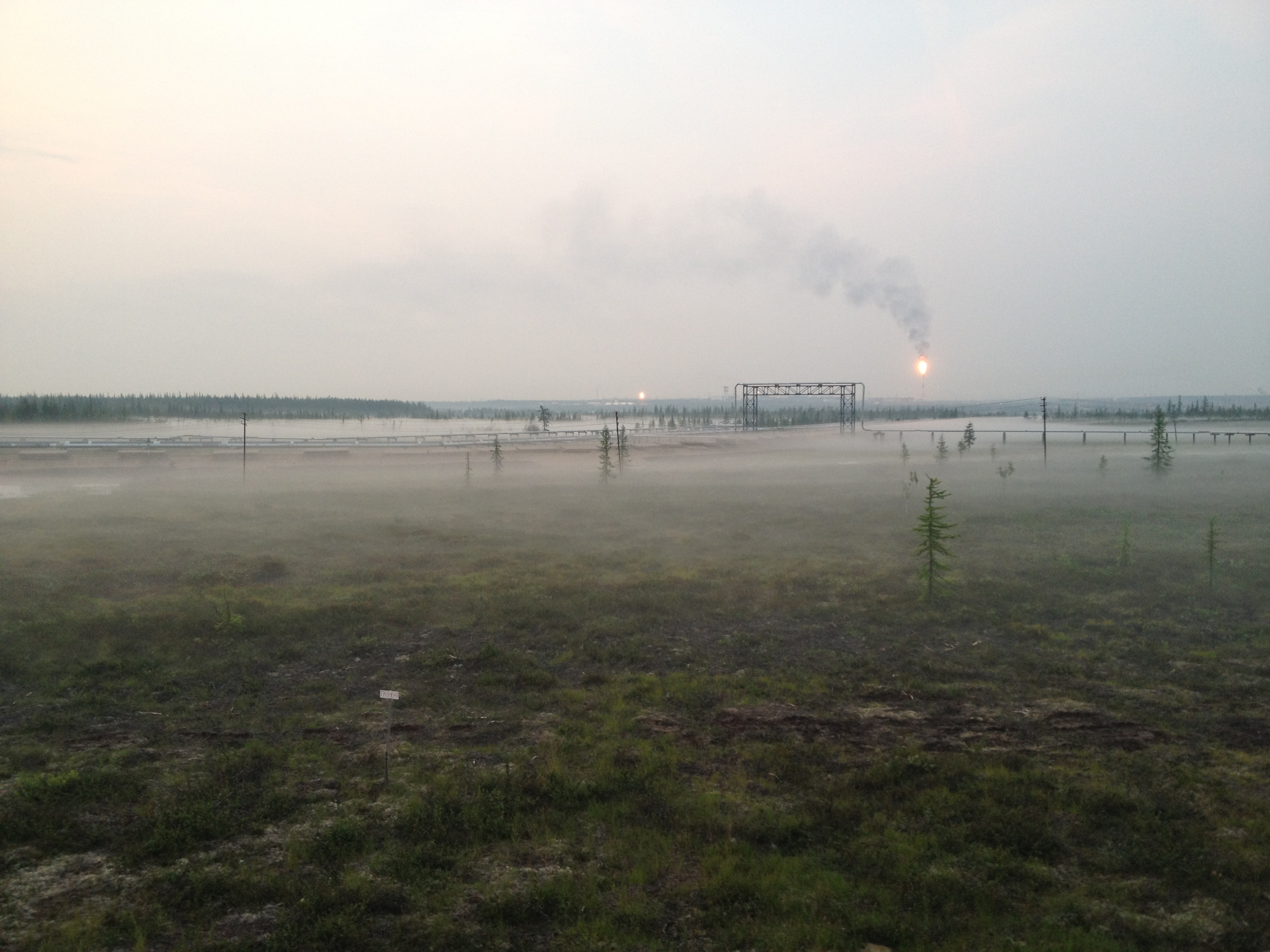 Ванкор на рассвете. Павел Гуренчук 2012.